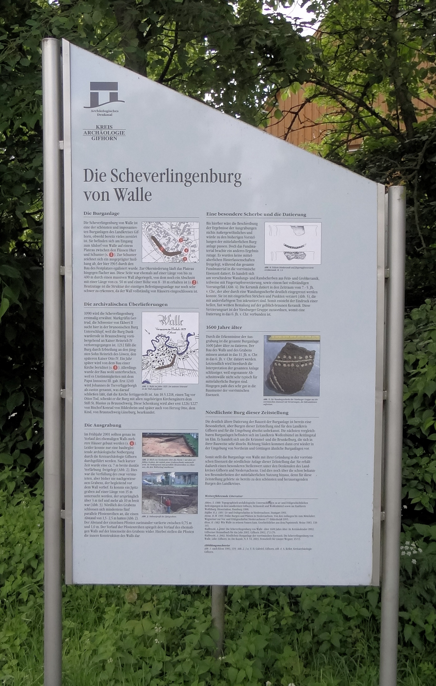 Informationstafel der Kreisarchäologie Gifhorn in Walle (Schwülper) über die Ausgrabungen zur Scheverlingenburg